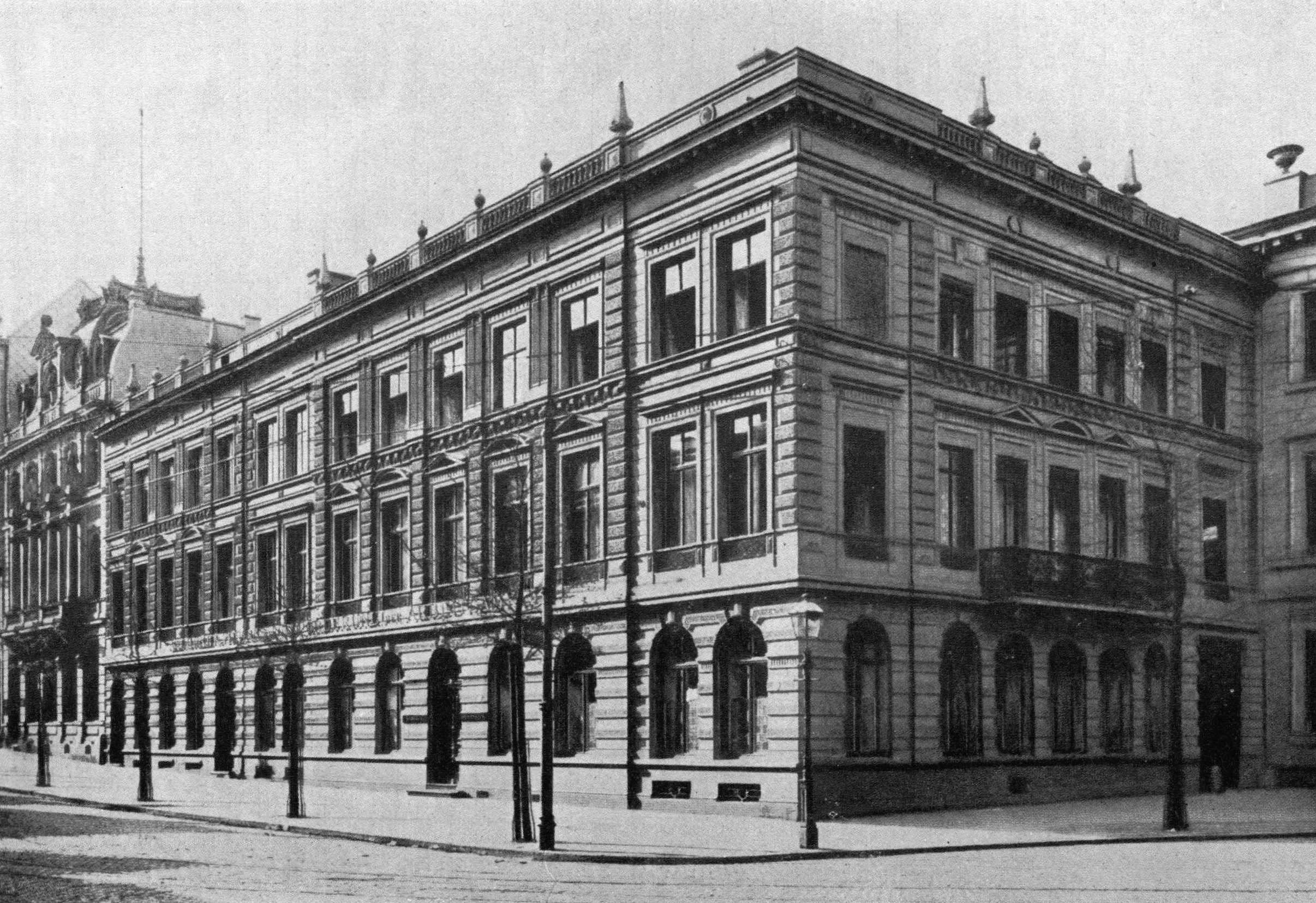 Die Landesbank der Rheinprovinz, vormals Aachener Verein zur Beförderung zur Arbeitsamkeit, Theaterstraße 2-4